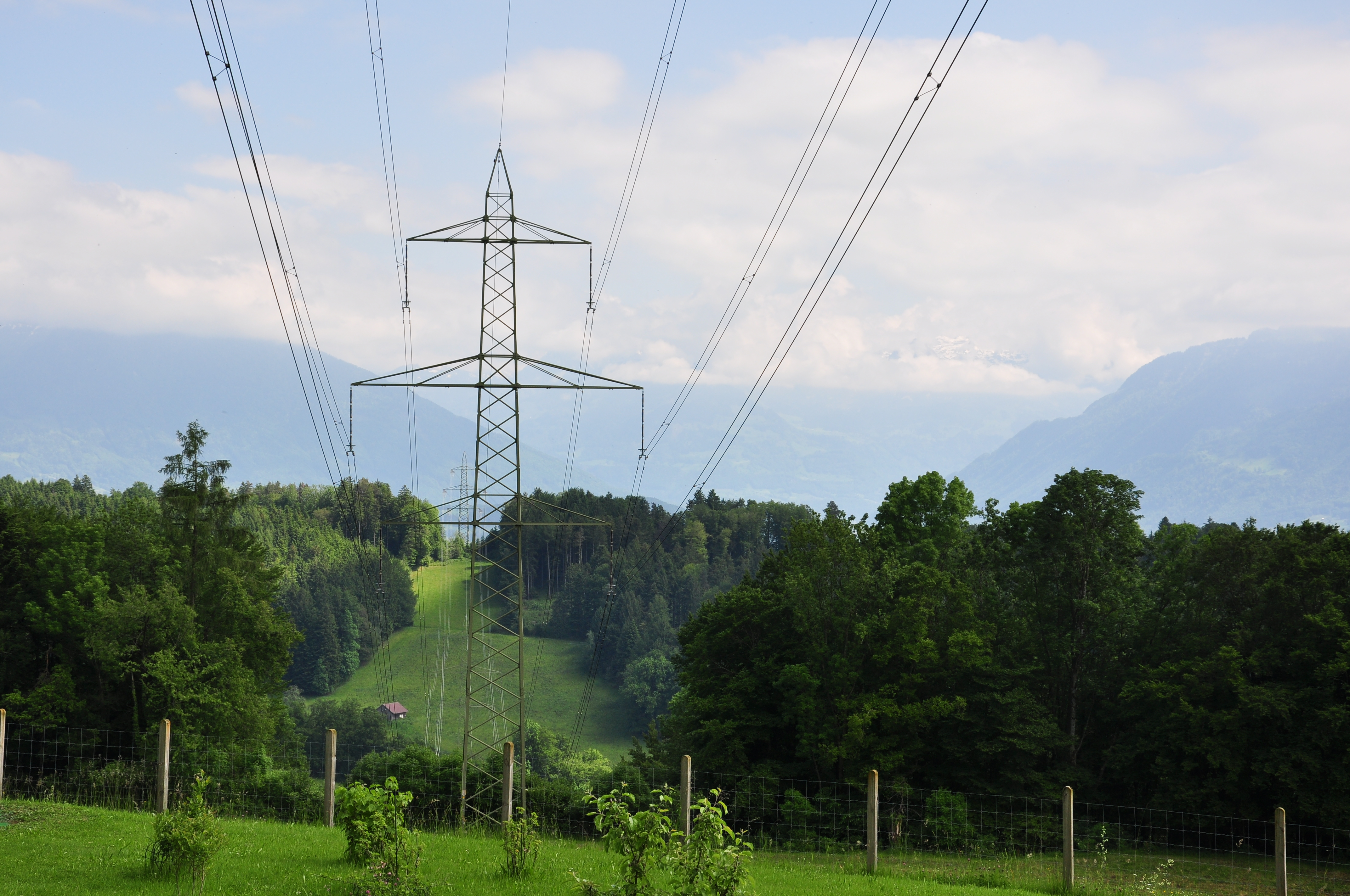 On Batzberg between Dachsegg in Rüti and Mettlen in Wald (Switzerland)